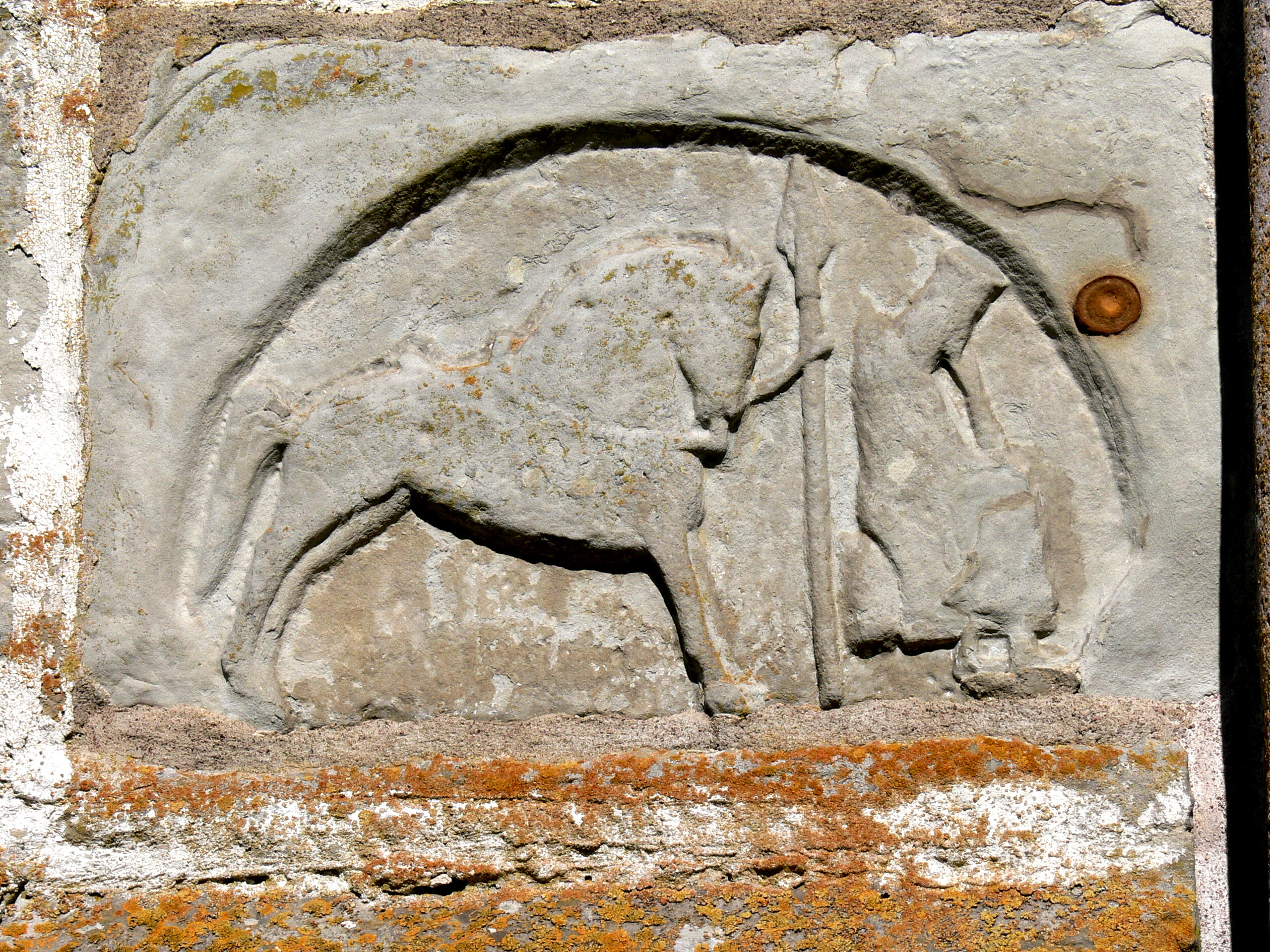 Grötlingbo Kyrka auf Gotland. Relief von Meister Sigraf ( 1200 ): Schlafender Wachtposten neben Pferd